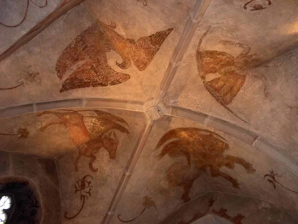 D'Fresken um Plafang vun der Klierwer Kapell vun der Munzer Kierch. Photo vum User Pear 15:51, 20 August 2006 (UTC). Munzen Kategorie:Gemeng Munzen